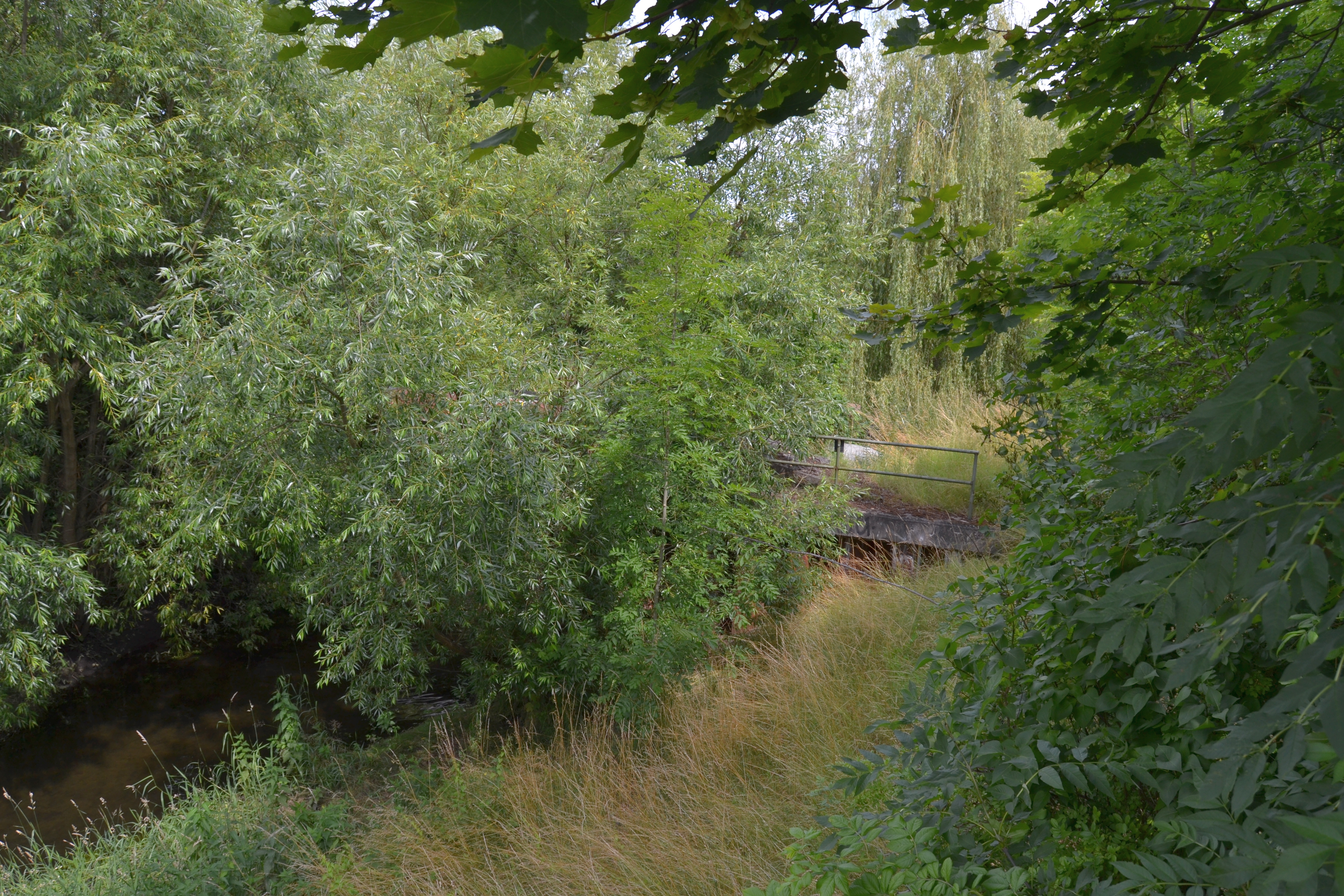 Landschaftspark Wuhletal, Geschützte Grünanlage in Berlin, Bezirk Marzahn-Hellersdorf.